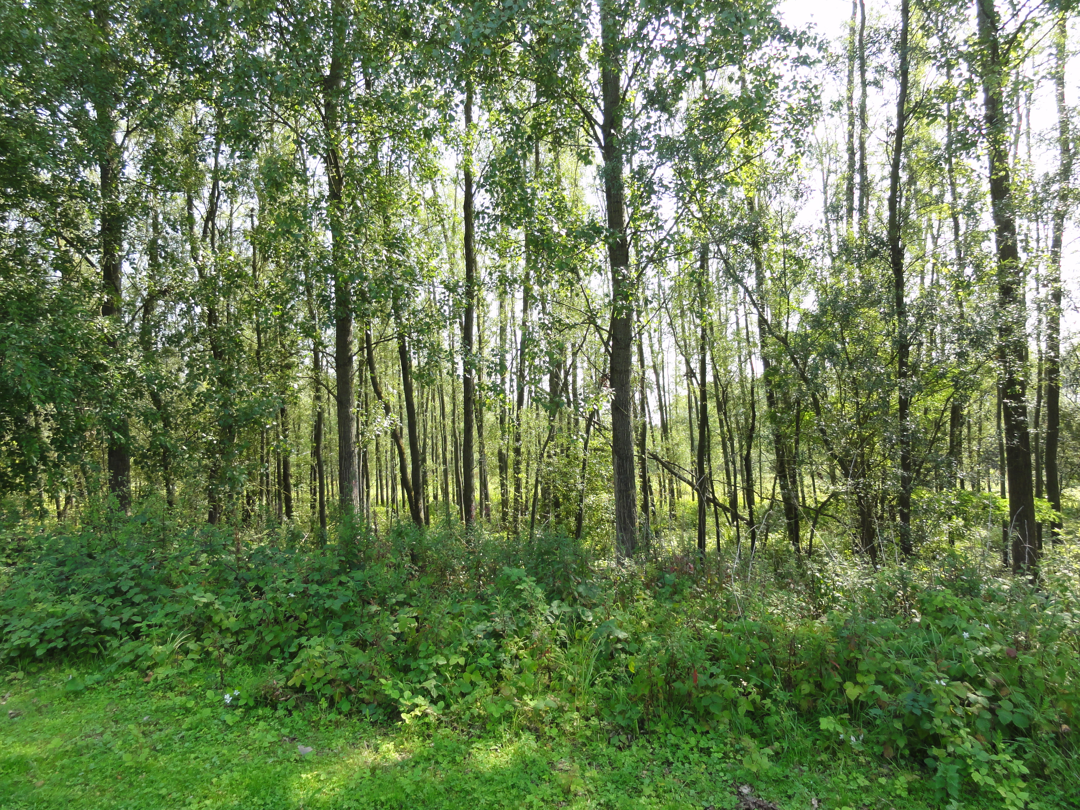 Terril n° 197 dit Saint Pierre, fosse Saint-Pierre de la Compagnie des mines de Thivencelle, Thivencelle, Nord, Nord-Pas-de-Calais, France.